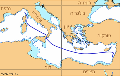 מסלול ההפלגה של אוניית המעפילים כ"ג יורדי הסירה